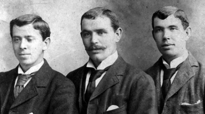 Robert, Jim en Dave Foulis uit St Andrews